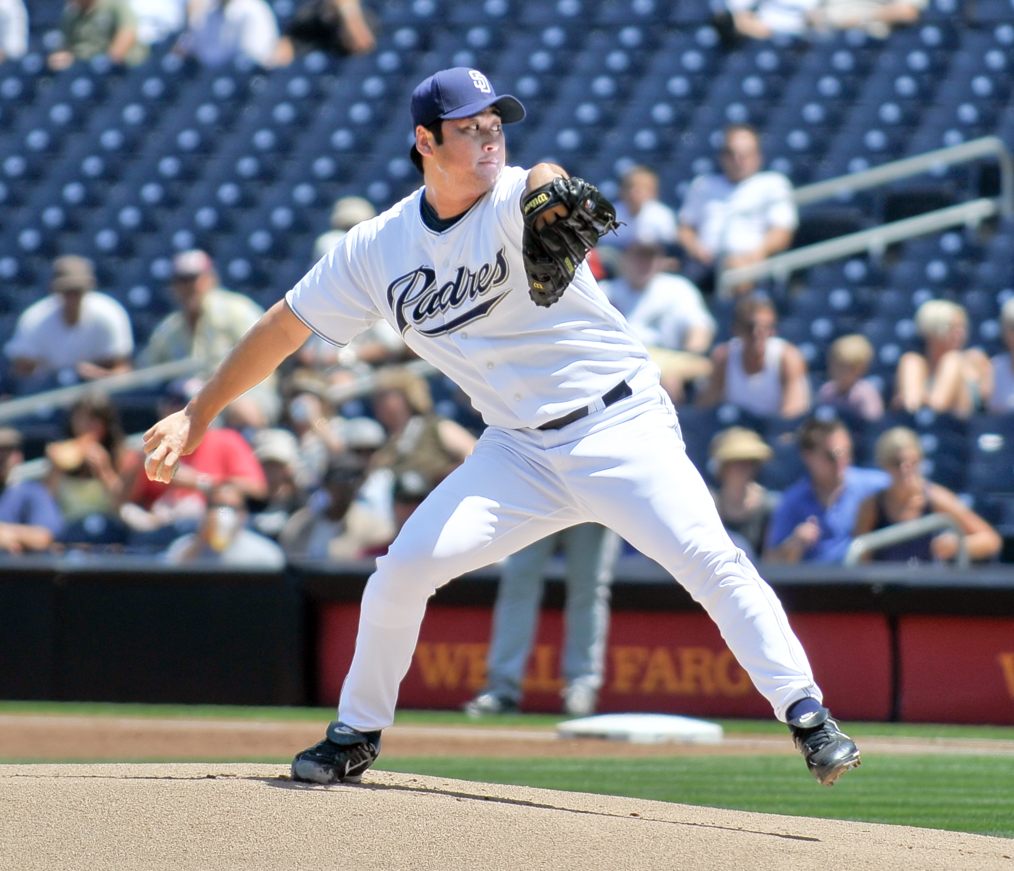 Cha Seung Baek